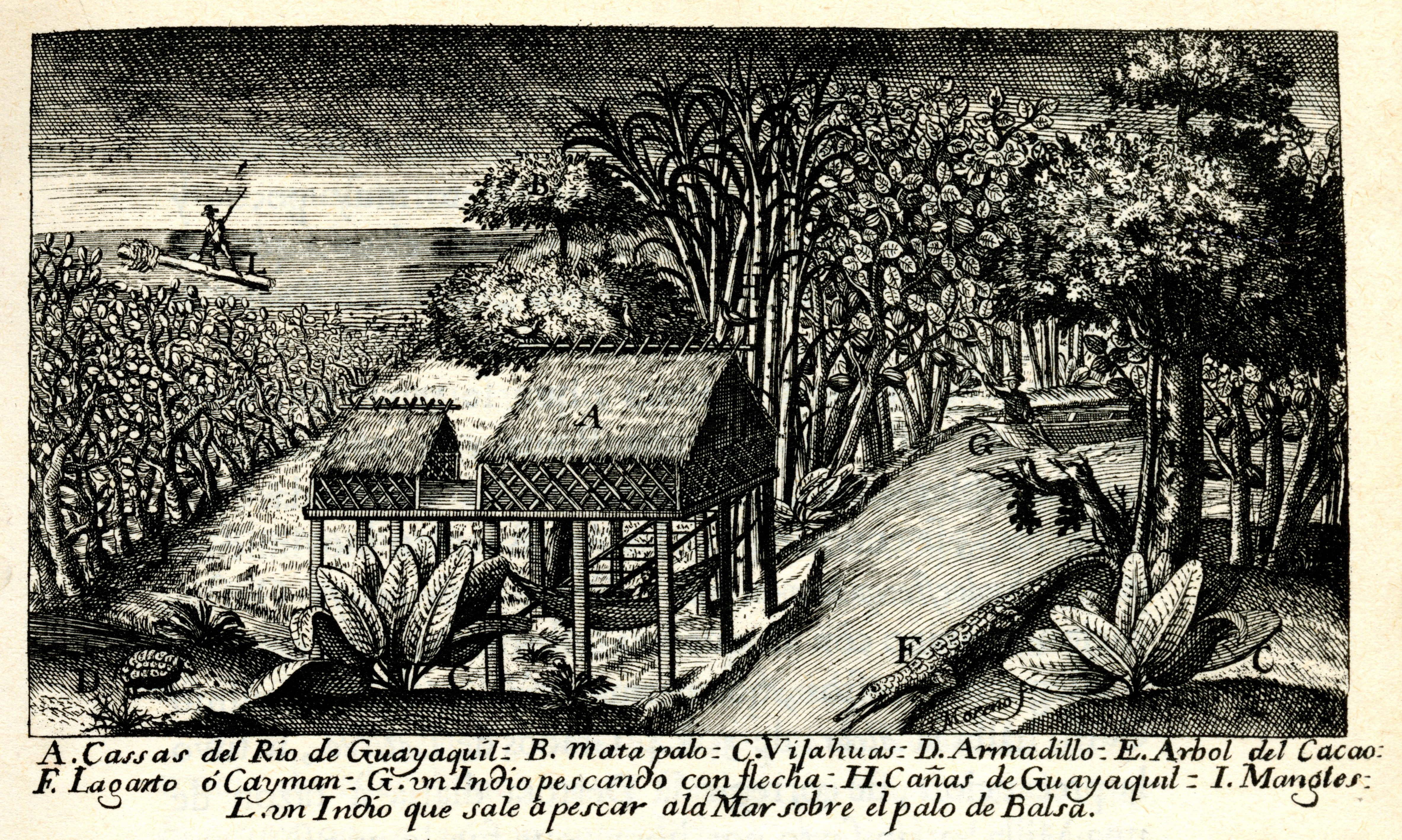 De Ulloa, Antonio y Jorge Juan. Relación Histórica del Viaje a la América Meridional, hecho de Orden de Su Majestad Católica para medir algunos Grados de Meridiano Terrestre, y venir por ellos en conocimiento de la verdadera Figura y Magnitud de la Tierra, con otras varias Observaciones Astronómicas y Físicas. Por Don Jorge Juan Comendador de Aliaga, en la Orden de San Juan, Socio correspondiente de la Real Academia de las Ciencias de París; y Don Antonio de Ulloa de la Real Sociedad de Londres: ambos por Capitanes de Fragata de la Real Armada. Primera Parte / Tomo I. Impresa por la Orden del Rey Nuestro Señor en Madrid por Antonio Marín, Año de MCDDXLVIII (1748). Diapositiva de Consulta y acceso publico cuya información fue investigada de un libro y/o ejemplar de revisión custodiado en los Fondos Bibliográficos (Sección Siglo XVIII o Etapa Colonial) del Archivo Histórico del Guayas; Guayaquil, Ecuador.Consultado y compartido por el usuario J. Javier García A.